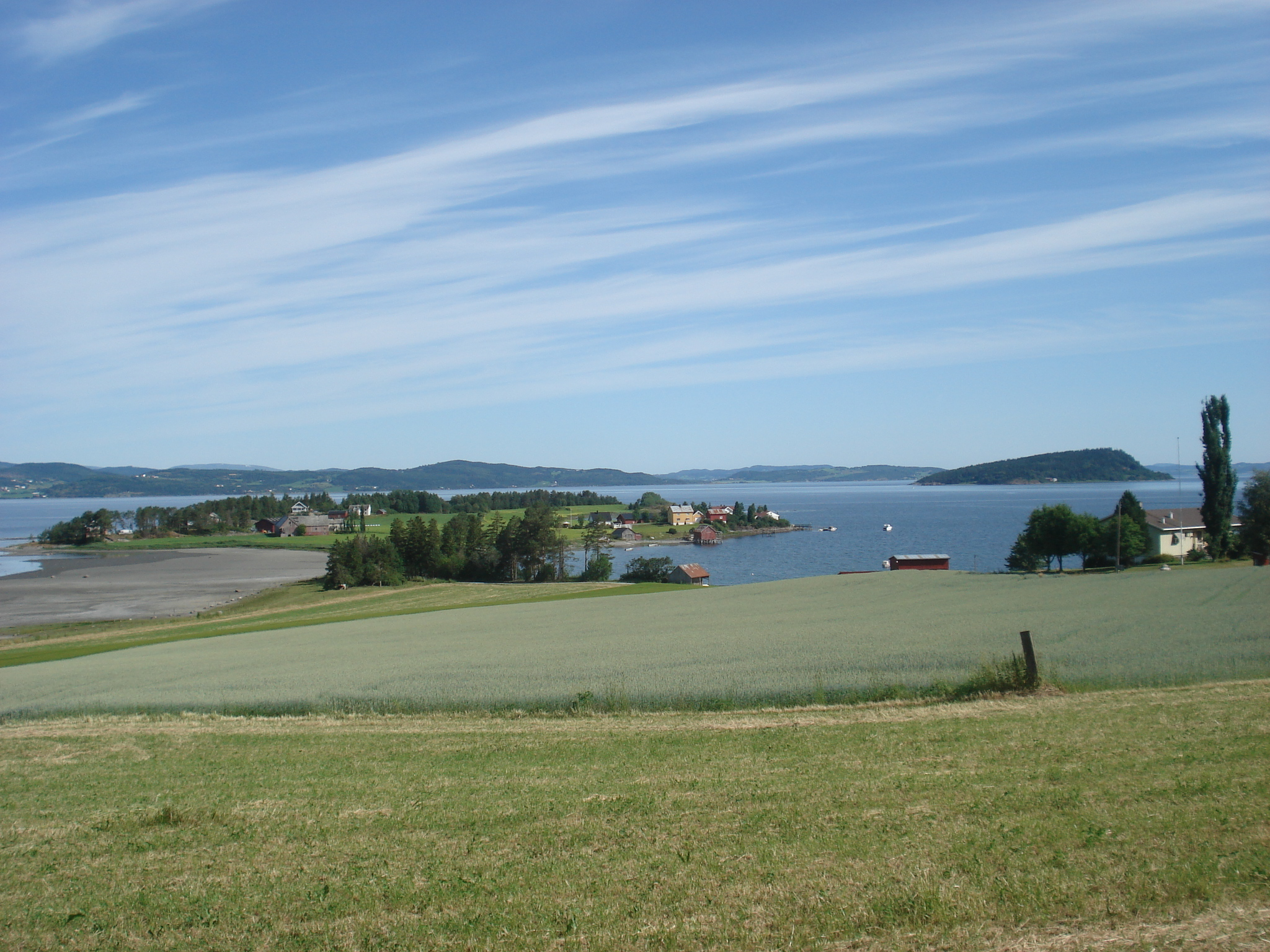 Srandholmen på Ekne i Levanger.